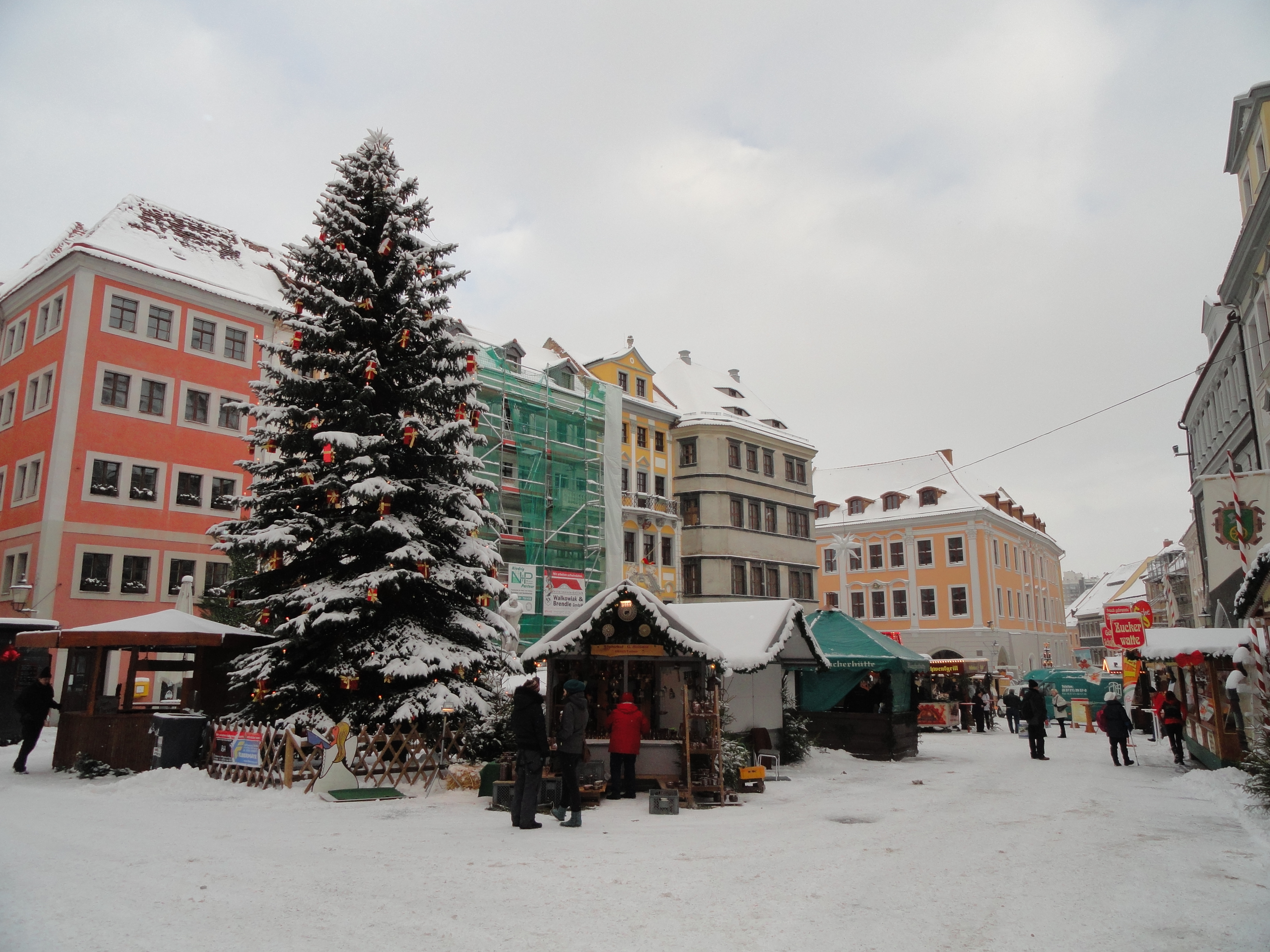 Schlesischer Christkindelmarkt auf dem Untermarkt in Görlitz